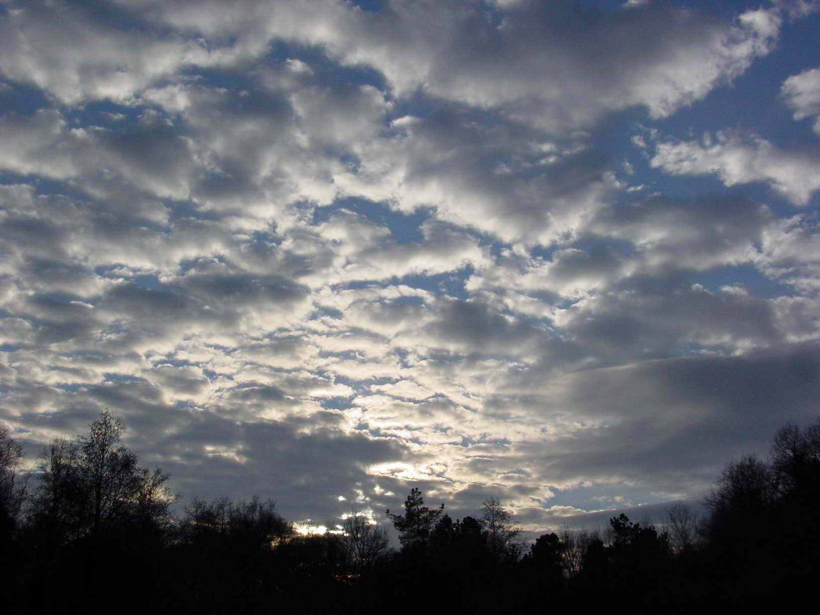 self made. O ceo a tres quilómetros de Arzua